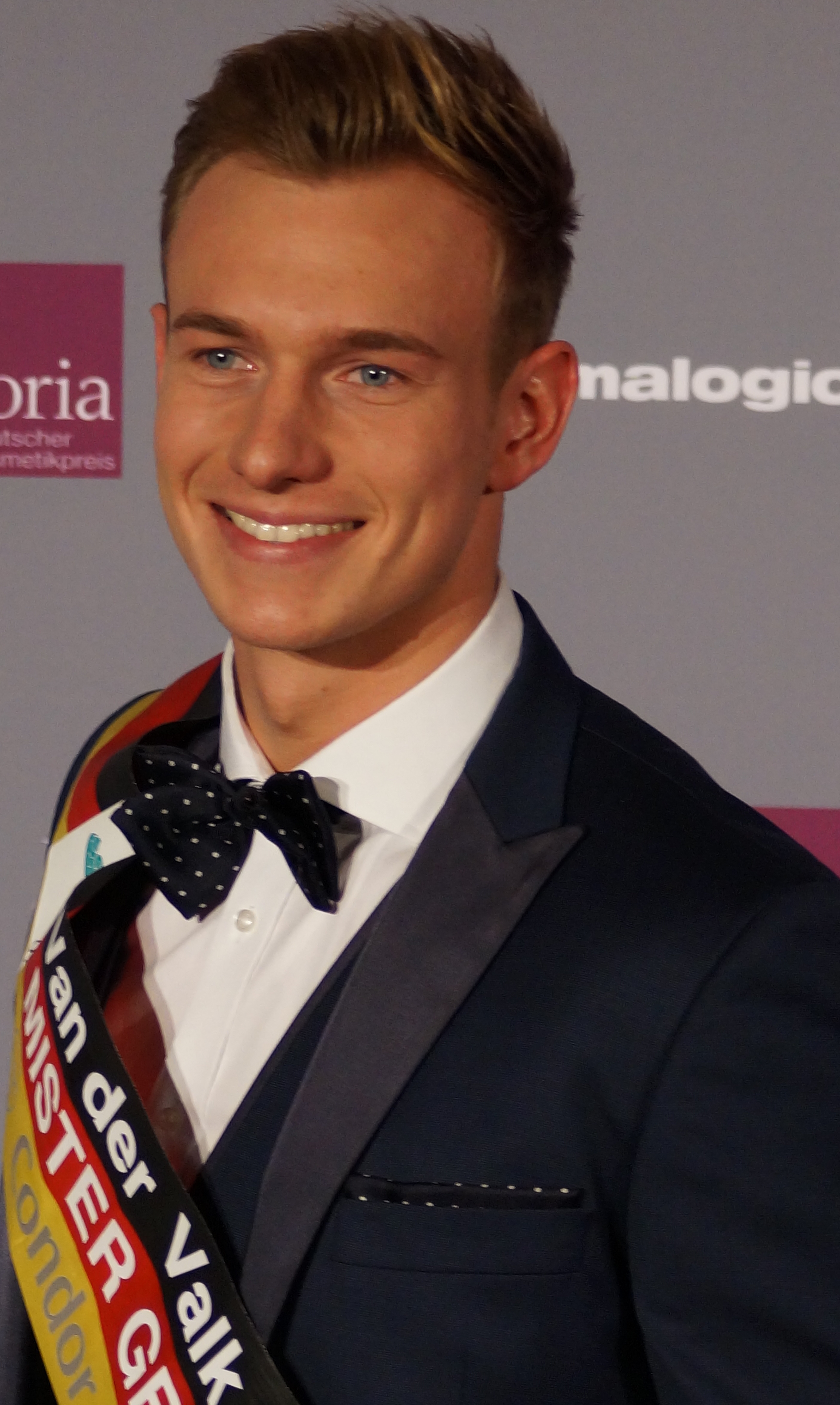 "Gloria – Deutscher Kosmetikpreis" am 27. März 2015 im Hilton Hotel Düsseldorf.